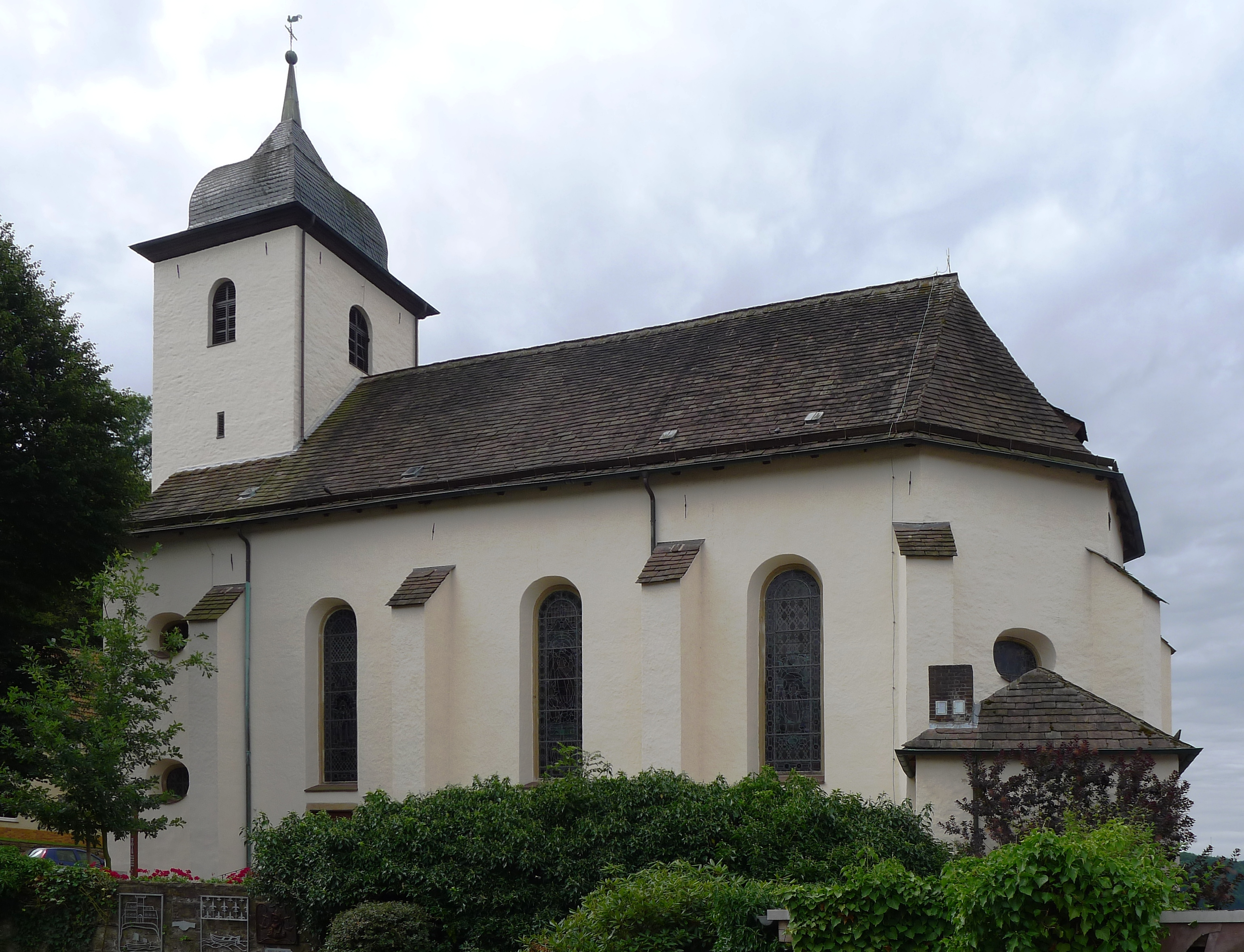 Blick auf St. Bartholomäus